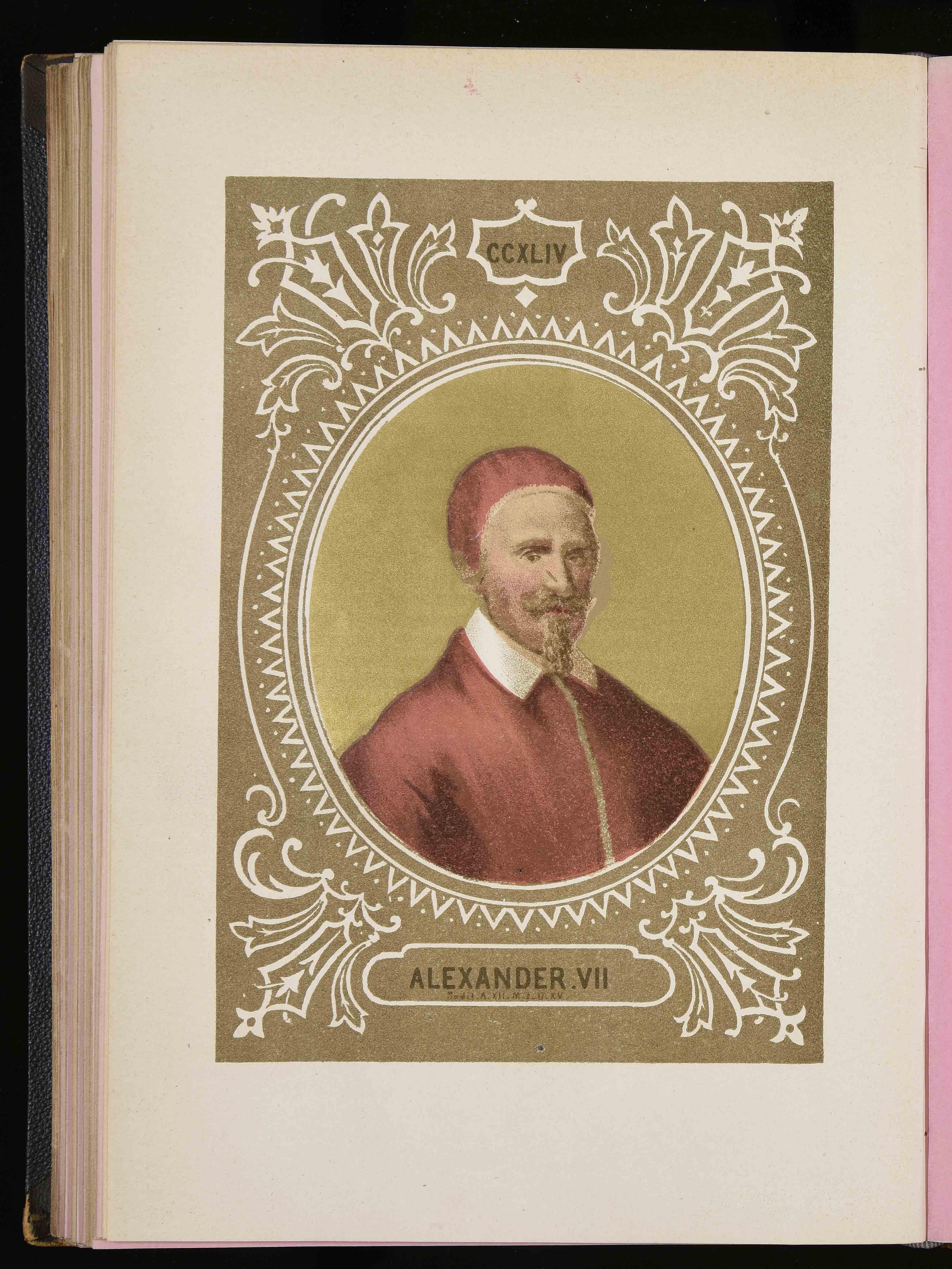 Cromolitografia in L. Tripepi, Ritratti e biografie dei romani pontefici: da S. Pietro a Leone 13, Roma, Vaglimigli Davide, 1879.